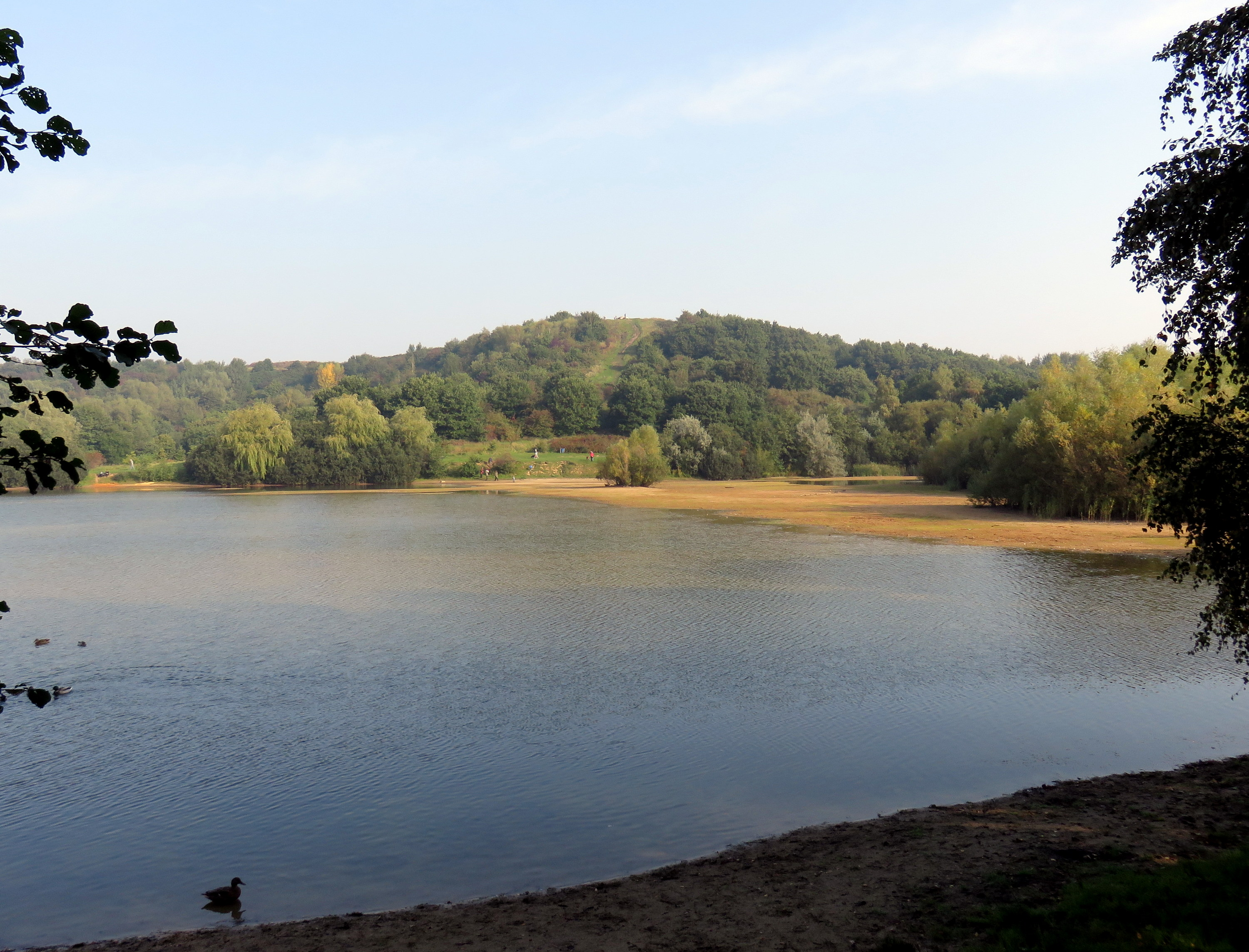 Hummelsee (teilweise trockengefallen im Sommer 2015) bei alter Mülldeponie „Müllberg“ in Hamburg-Hummelsbüttel. – Der See liegt im Landschaftsschutzgebiet „Hummelsbütteler Feldmark/Alstertal“ und dient teilweise der Naherholung. Südufer.